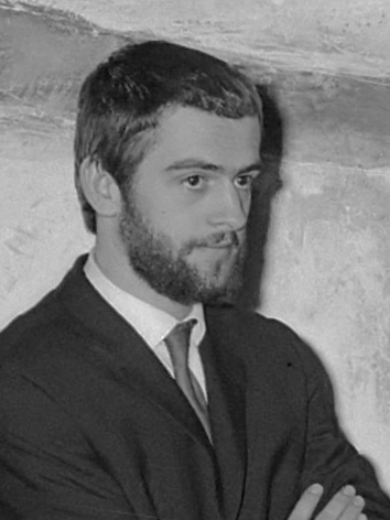 Schilders bij de Koningin op Paleis Soestdijk, v.l.n.r. Pat Andrea, Gustave Asselbergs, Hans Hamers, Hare Majesteit, Joop van Meel en A. C. Klop 11 januari 1964